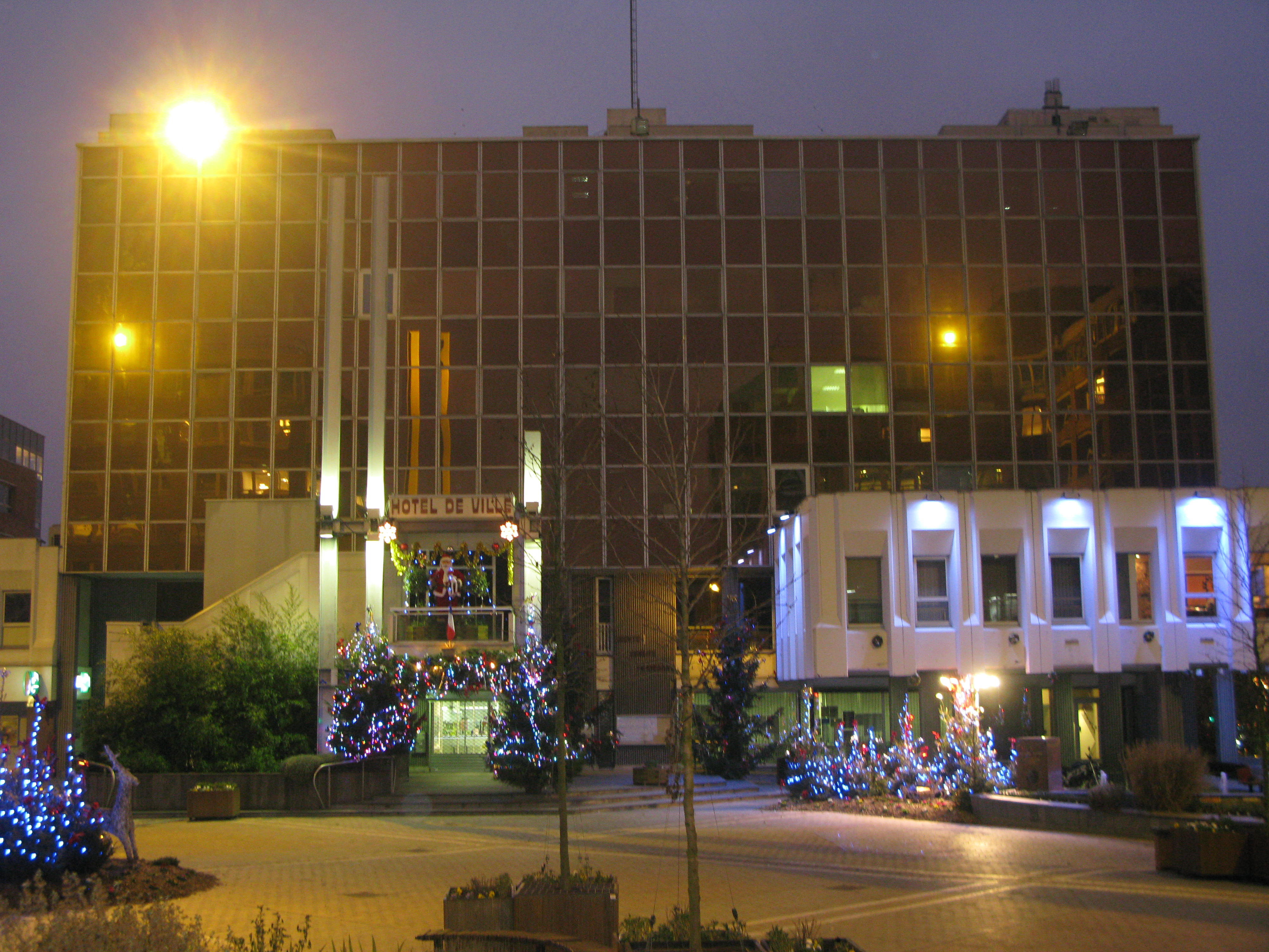 Hotel de ville de Villeneuve d'Ascq